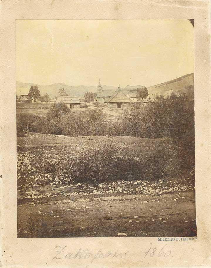 Zakopane. Zespół dworsko-parkowy w Kuźnicach, okolice i wnętrza. Melecjusz Dutkiewicz - ul. Kościeliska i kościoł p.w. św. Klemensa. Najstarsza znana fotografia Zakopanego, 1860 r.